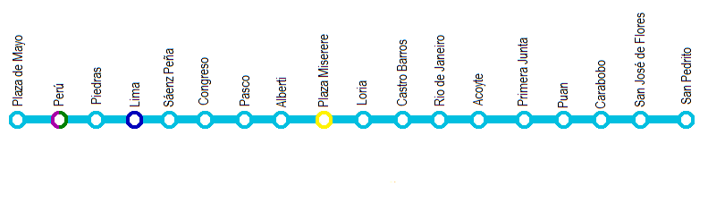 Raffigurazione grafica Linea A Buenos Aires